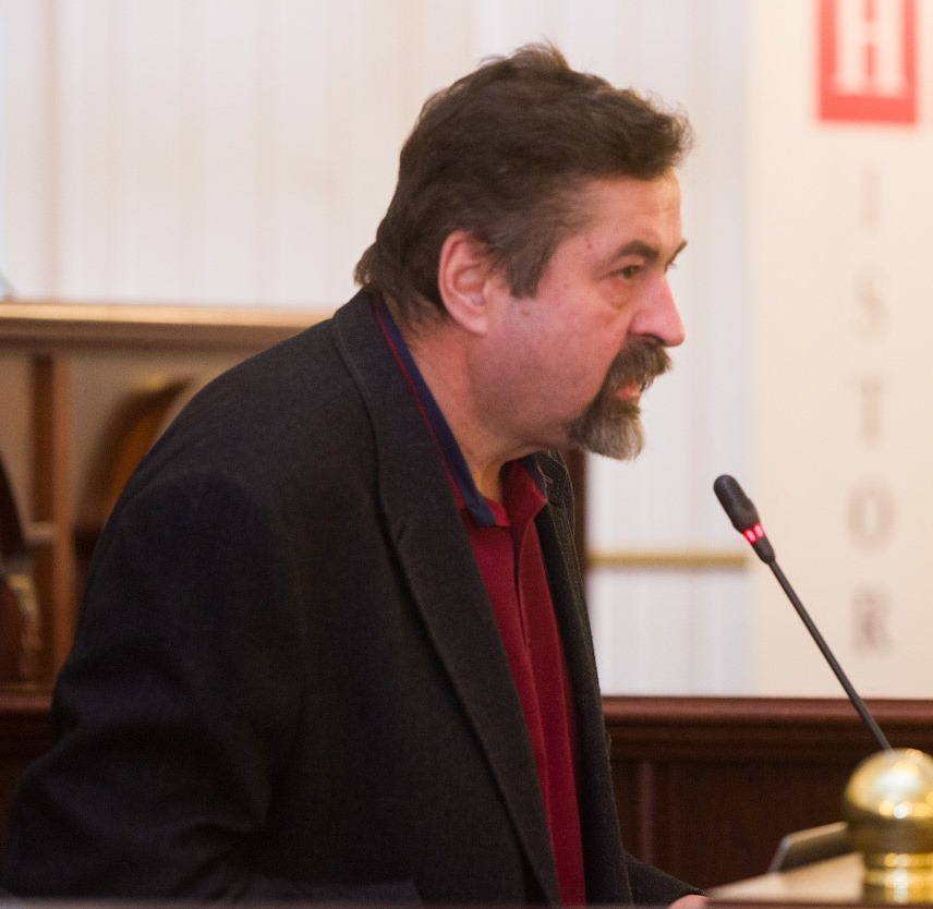 historik Lobor Jan (2019)